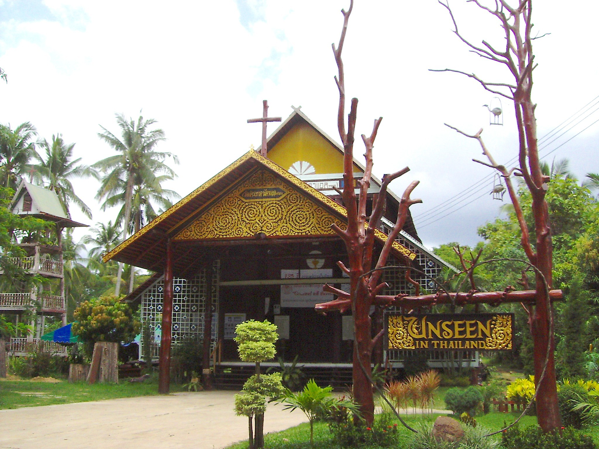 วัดอัครเทวดามีคาแอล ณ บ้านหนองซ่งแย้ ต.คำเตย อ.ไทยเจริญ จ.ยโสธร